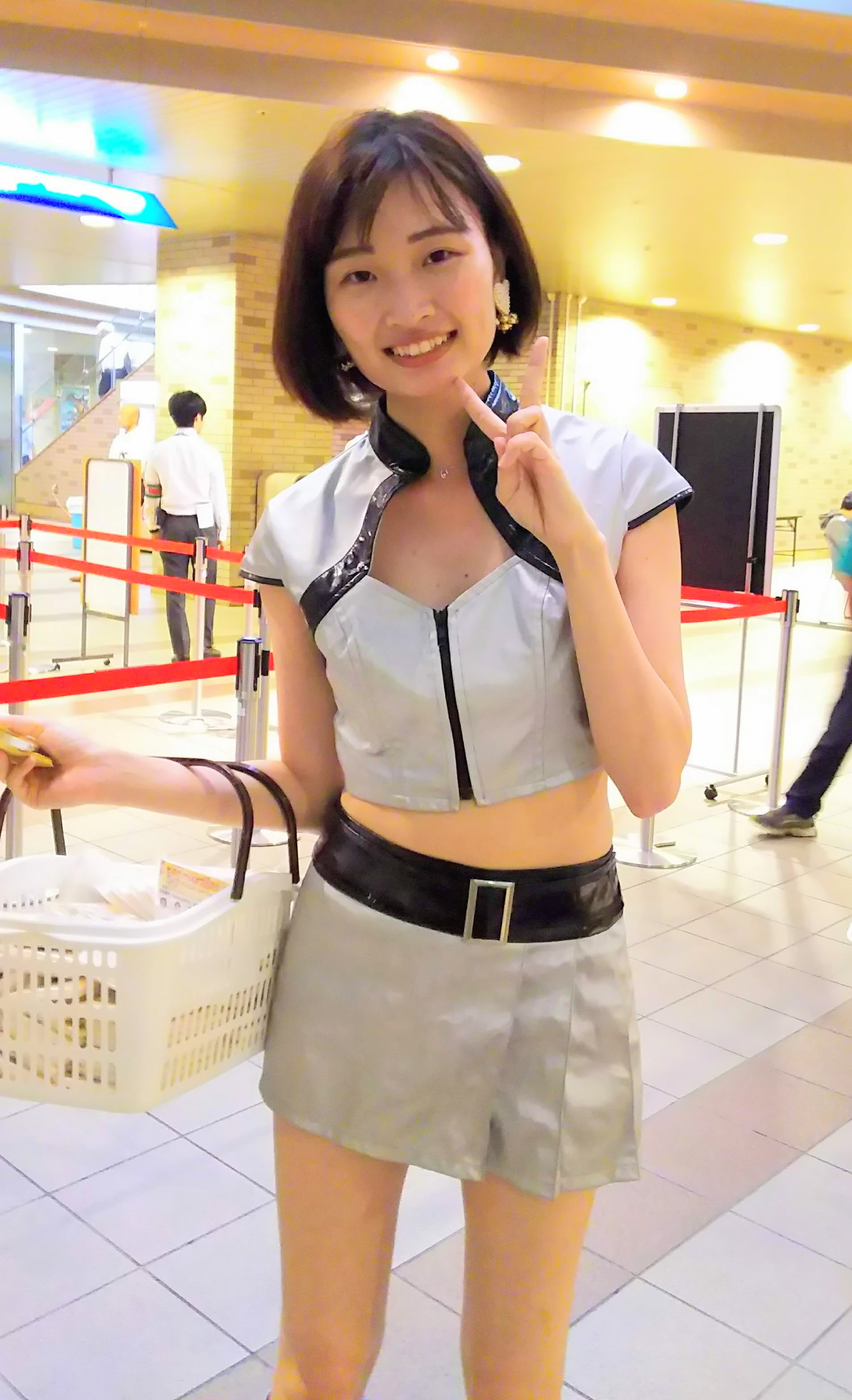 初本瑞穂（2019年9月22日 そのだけいばトークショー 神戸新聞杯予想トークショー 園田プリンセスカップ展望トークショー）